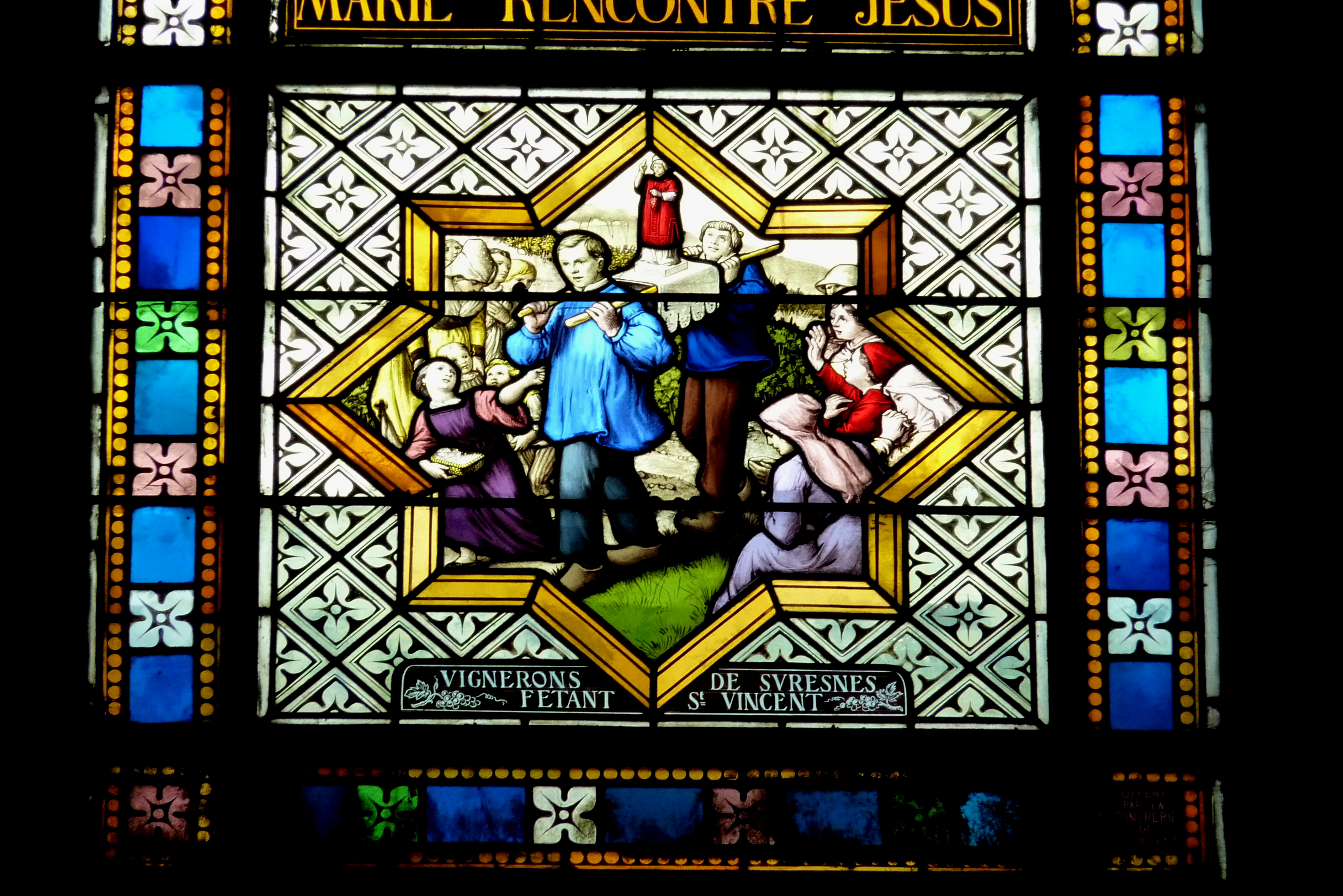 Bleiglasfenster (Ausschnitt) in der katholischen Pfarrkirche Cœur-Immaculé-de-Marie in Suresnes, Darstellung: Winzer in Suresnes feiern das Fest des hl. Vinzenz